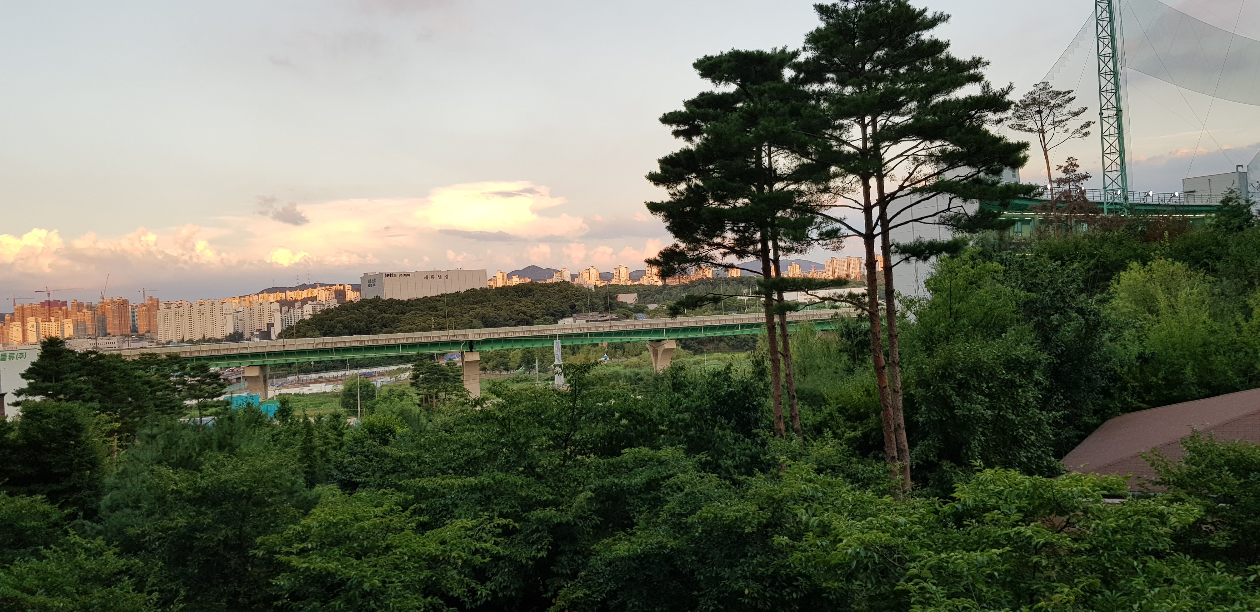 구름이 있는 저녁때, 청명호수마을에서 바라본 기흥저수지쪽